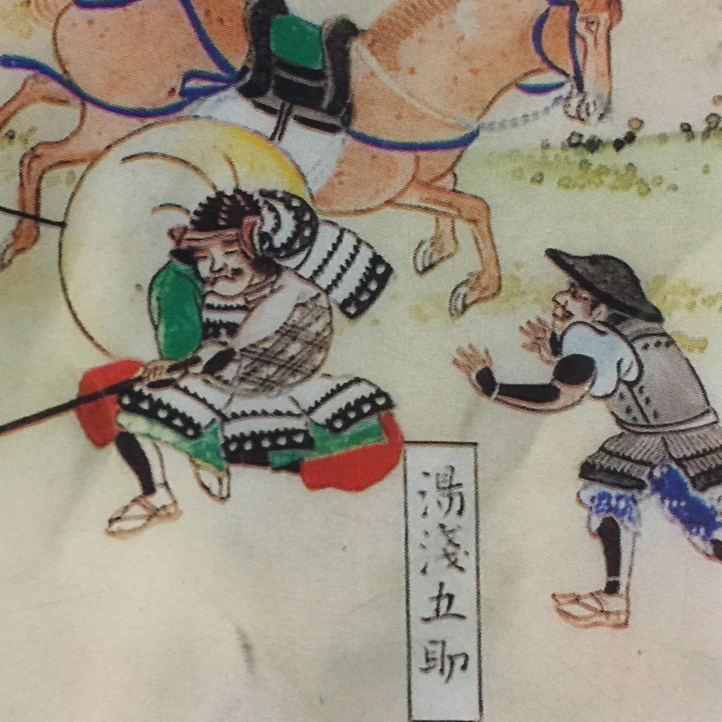 関ヶ原合戦図屏風（関ケ原町歴史民俗資料館本）に描かれた、大谷吉継家臣の湯浅五助。